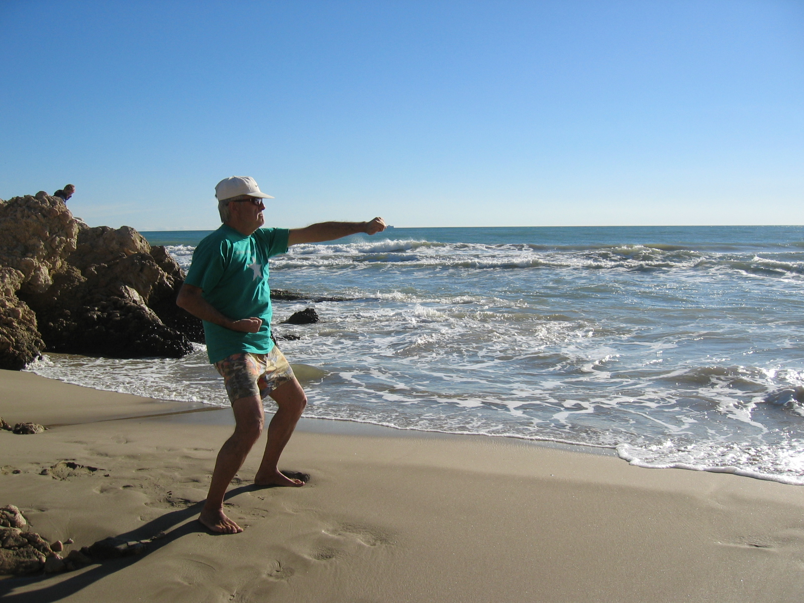 7è moviment de txi kung - Baduanjin foto meva novembre 2006 Joan Inglada Lliure ús